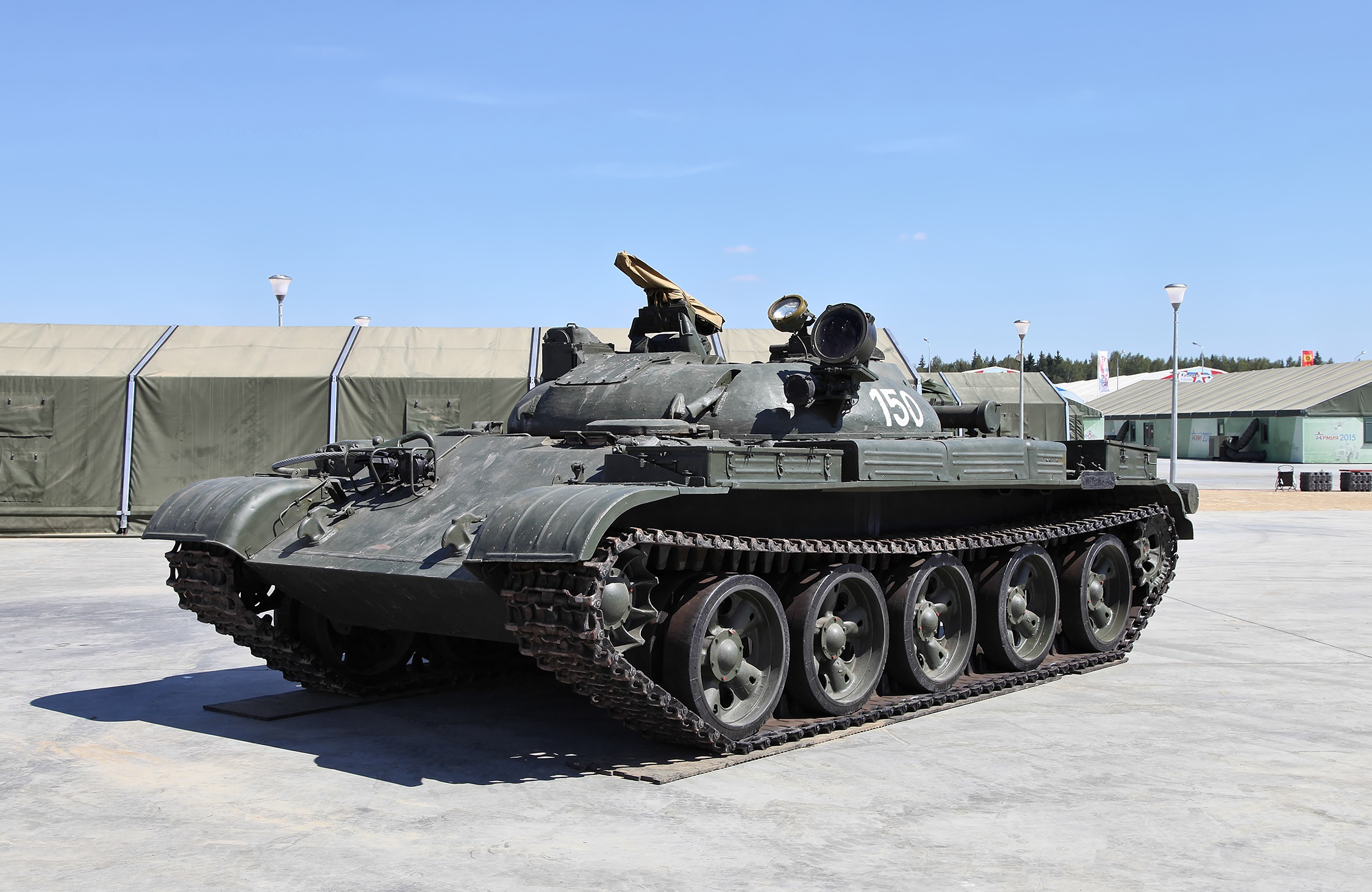 ракетный танк ИТ-1 в экспозиции парка "Патриот".